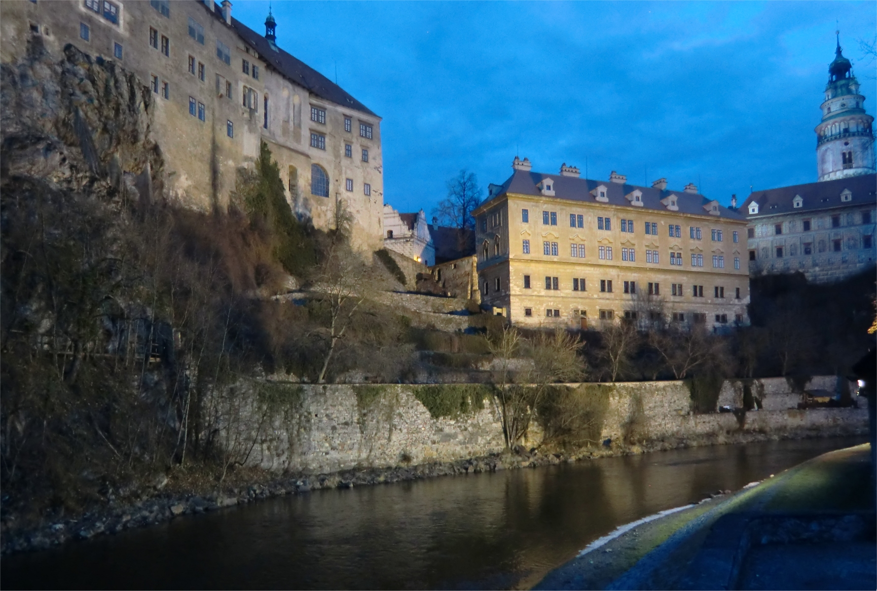 Cesky Krumlov slott